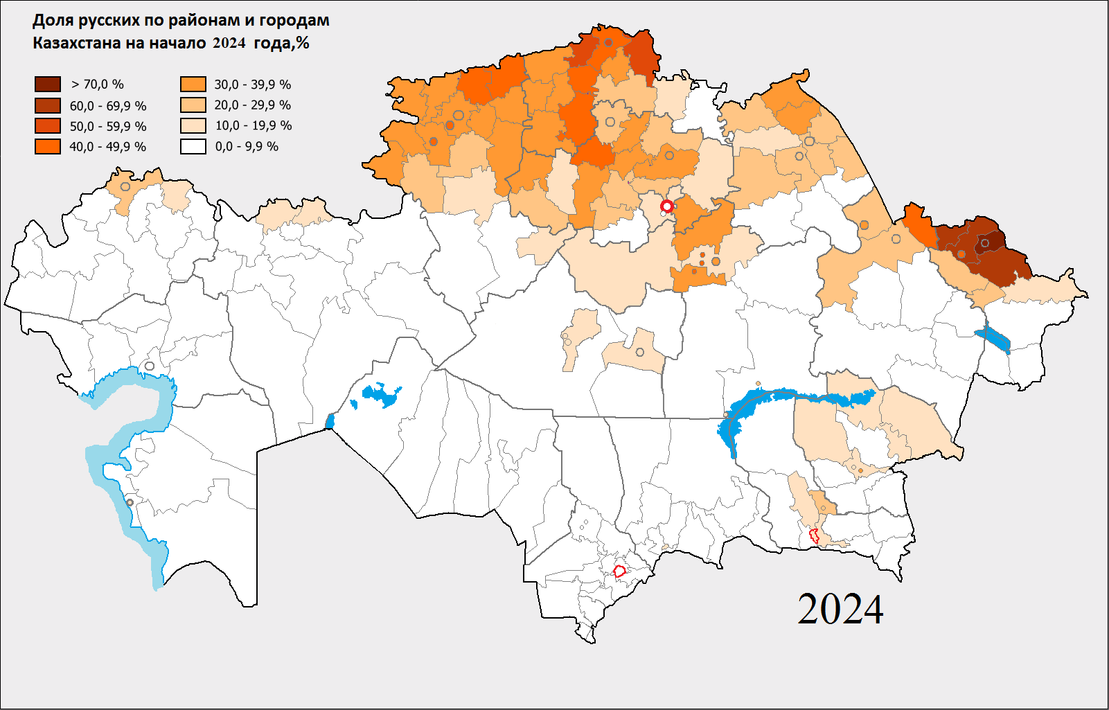 русские в Казахстане 2019г